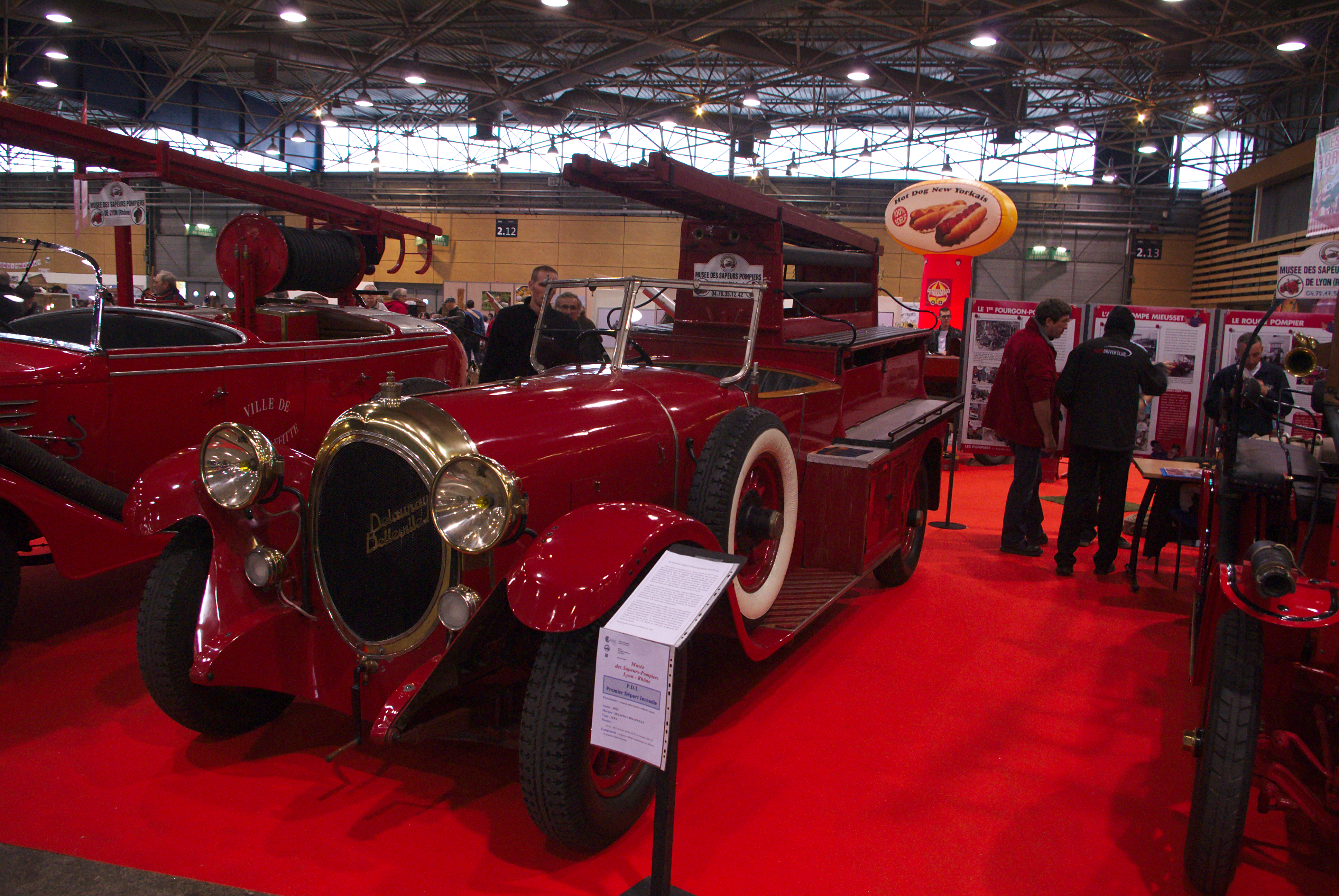 Premier Départ incendie Delaunay-Belleville M.E 6 de 1922 à Epoqu'auto 2012